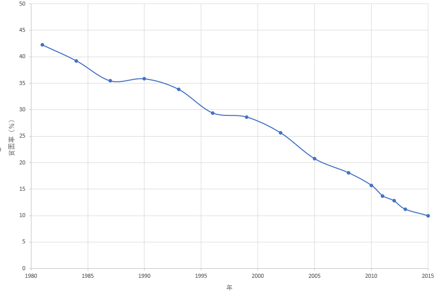 1日1.9ドル（2011年米ドル基準）未満貧困層が世界人口に対する割合を、1980年～2015年までの期間でどの位かを示すグラフです。